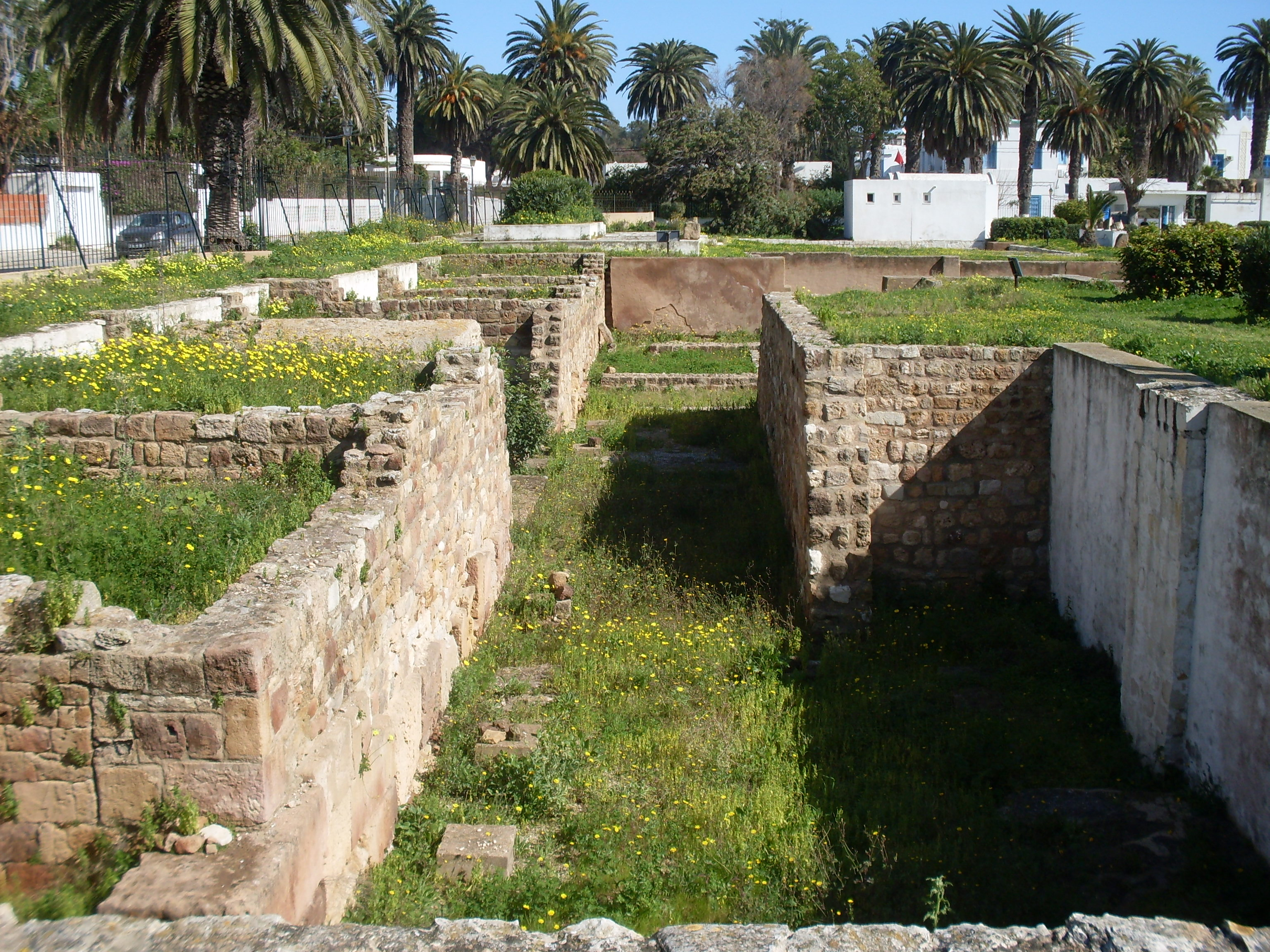 Quartier d'artisans romains avec caves et citernes le long d'une ruelle, bâties sur des maisons puniques